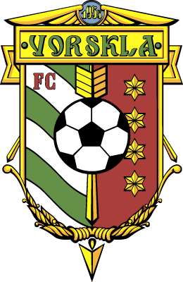 Емблема ФК Ворскла.png: Емблема ФК «Ворскла»